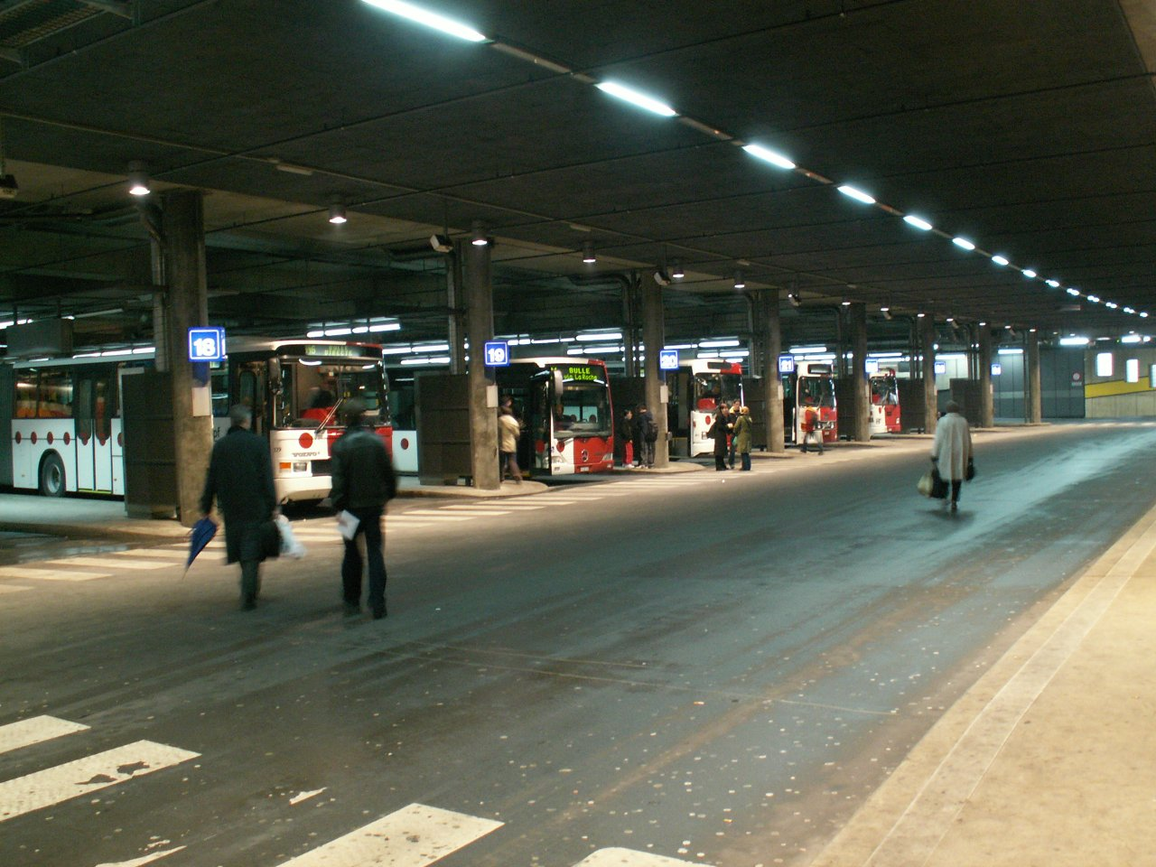 Busbahnhof der tpf in Freiburg, Kanton Freiburg, Schweiz.